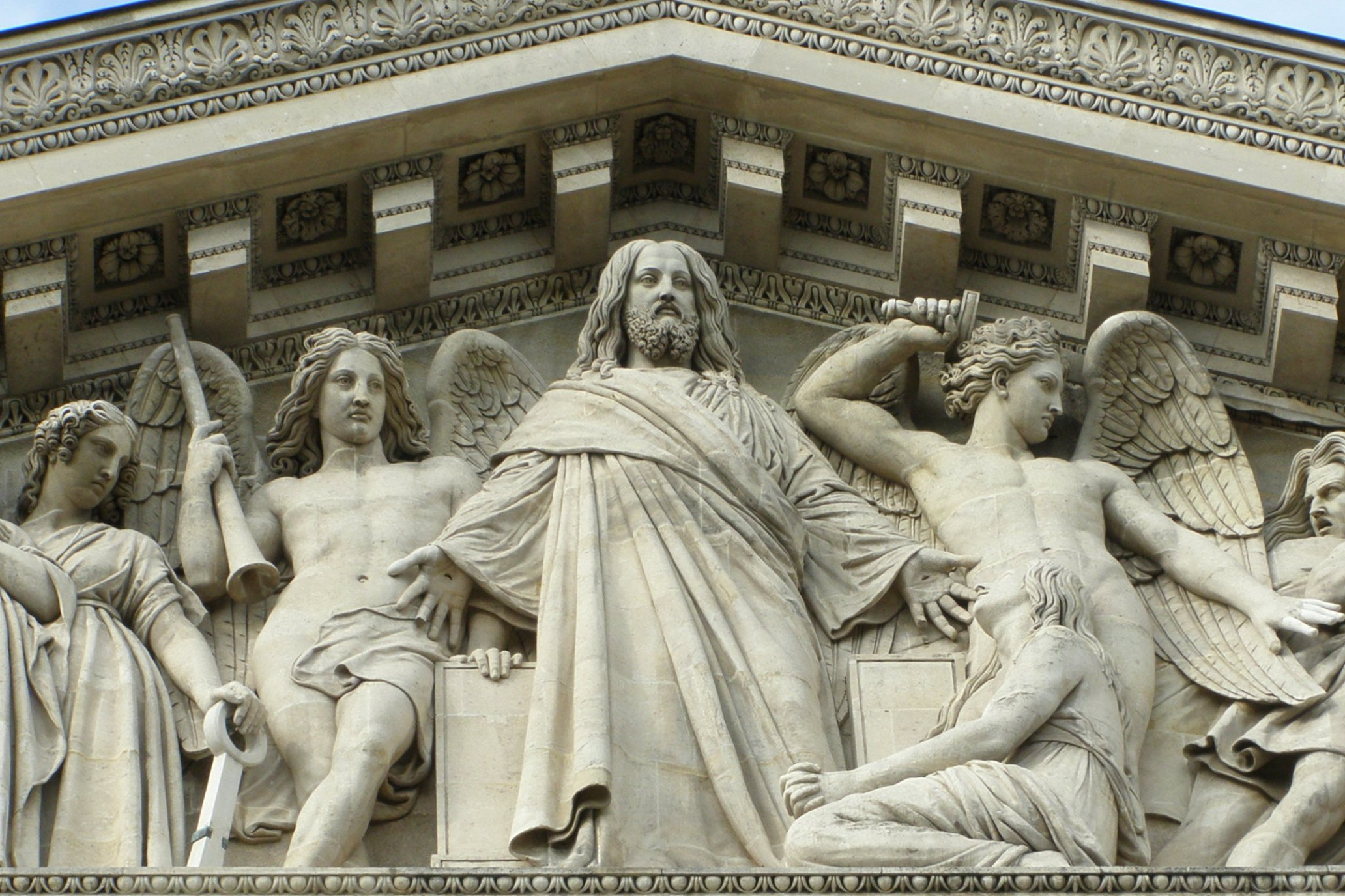 Église de la Madeleine